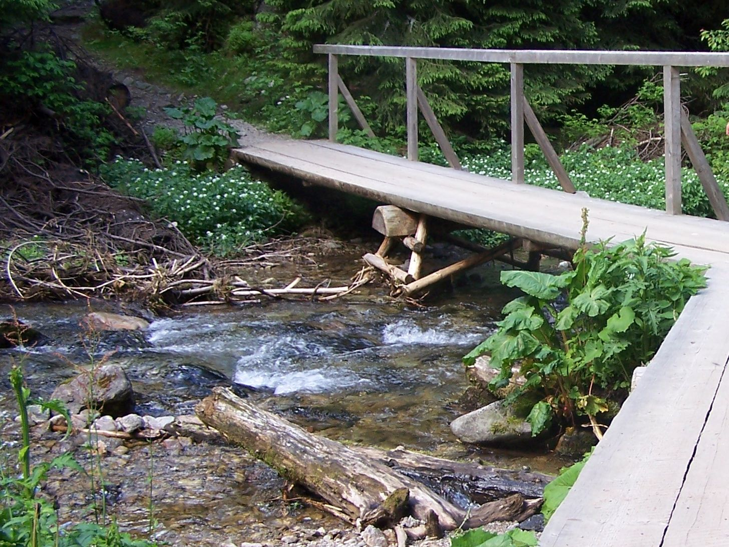 Pyszniański Potok za schroniskiem PTTK na Hali Ornak (przy szlaku na Iwaniacką Przełęcz